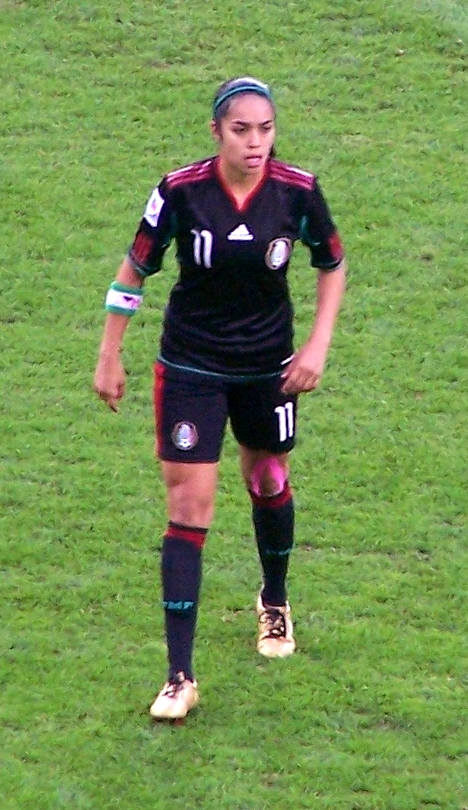 Renae Cuéllar beim Viertelfinale Südkorea-Mexiko der U-20-WM der Frauen 2010 in Dresden, Rudolf-Harbig-Stadion, 25.07.2010